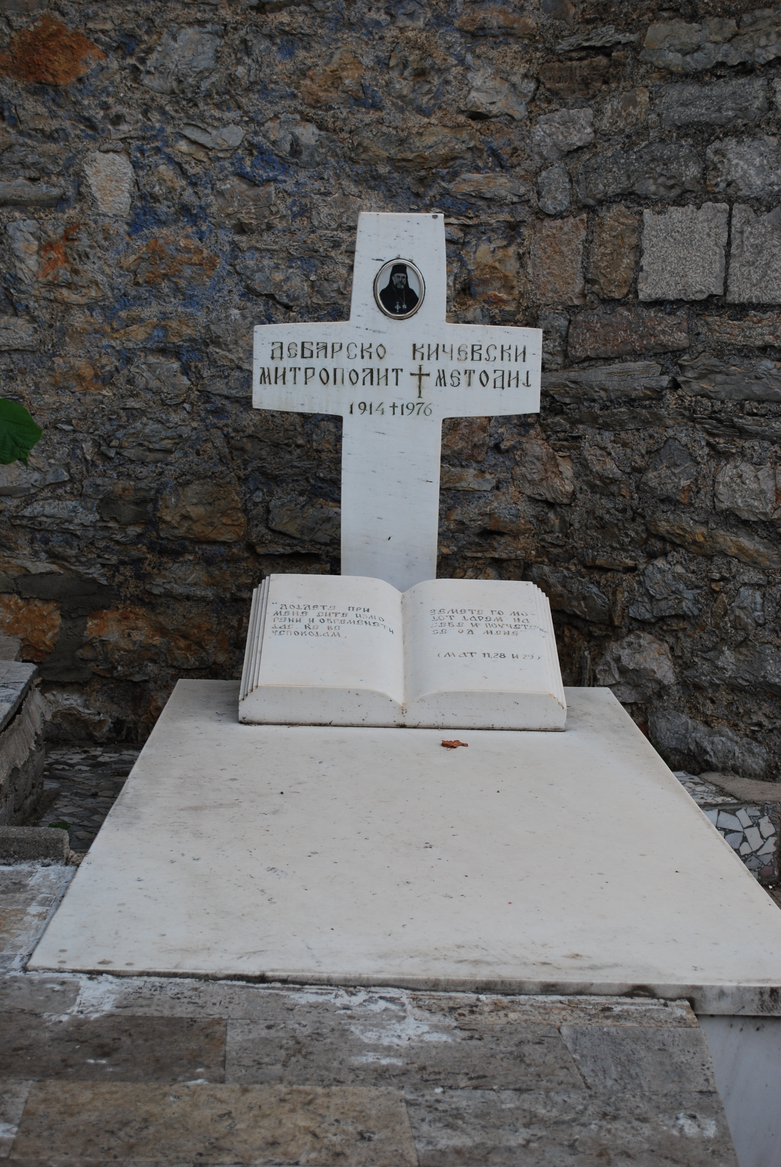 Гроб во Црквата „Св. Богородица“ Каменско во Охрид. Македонија